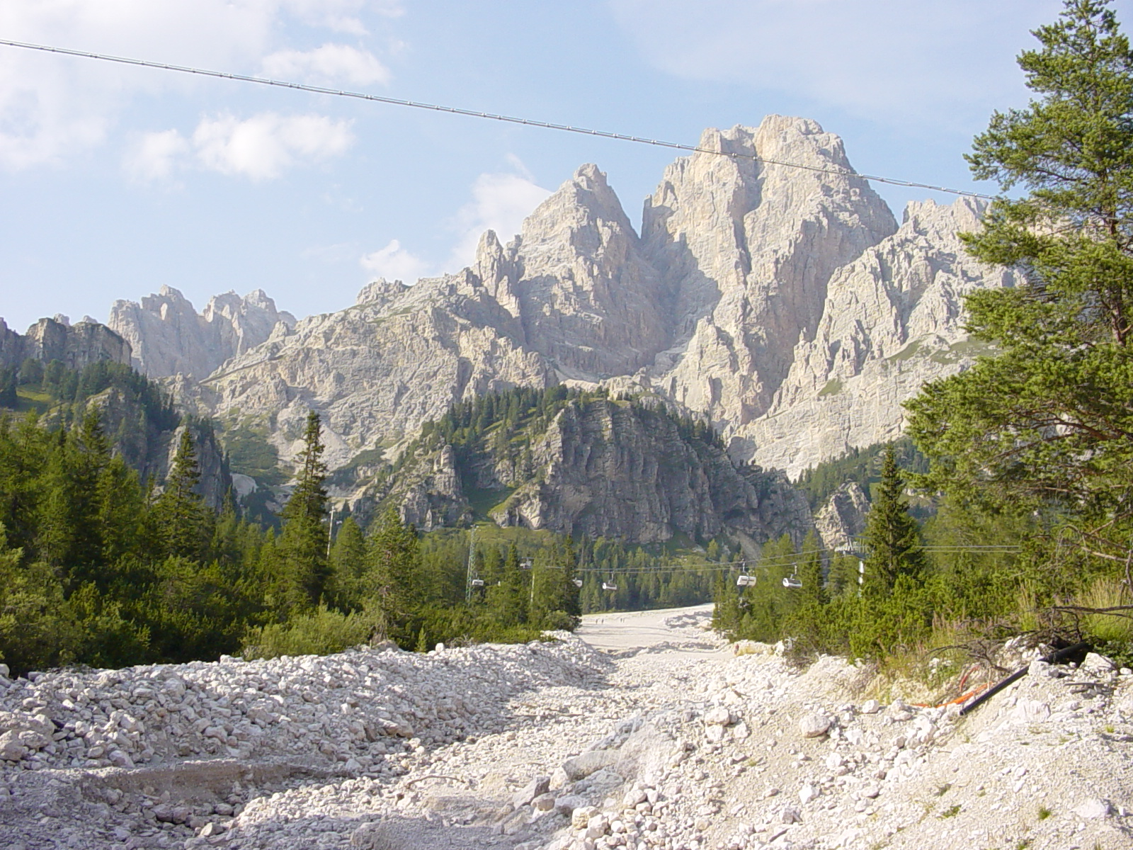 Italië, de Dolomieten